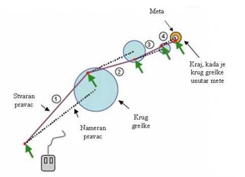 Koraci prilikom opažanja i kretanja kursorom